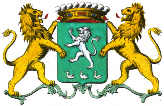 Armoires de la famille de Roest d'Alkemade